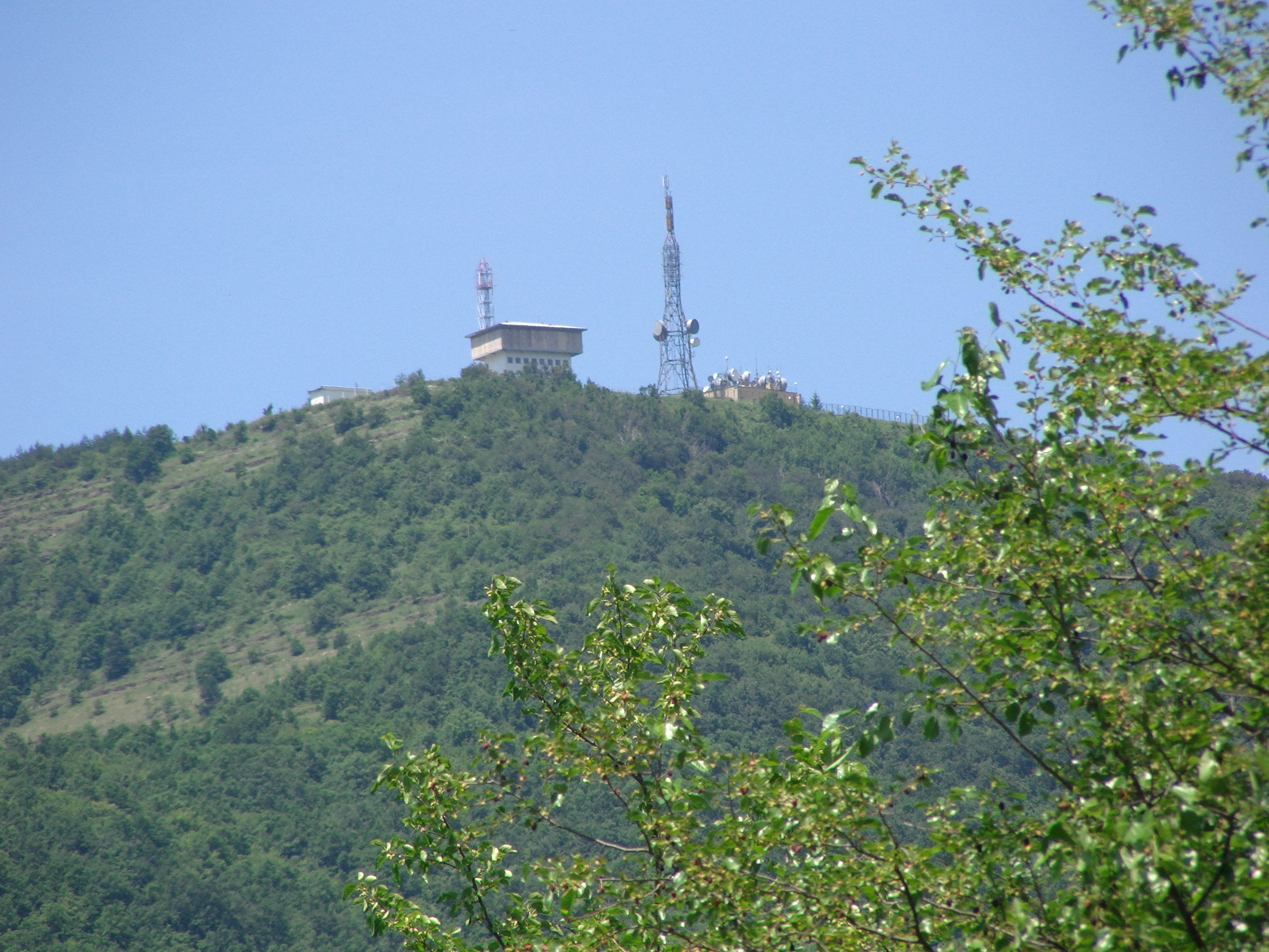 Връх Драгойца и РТС